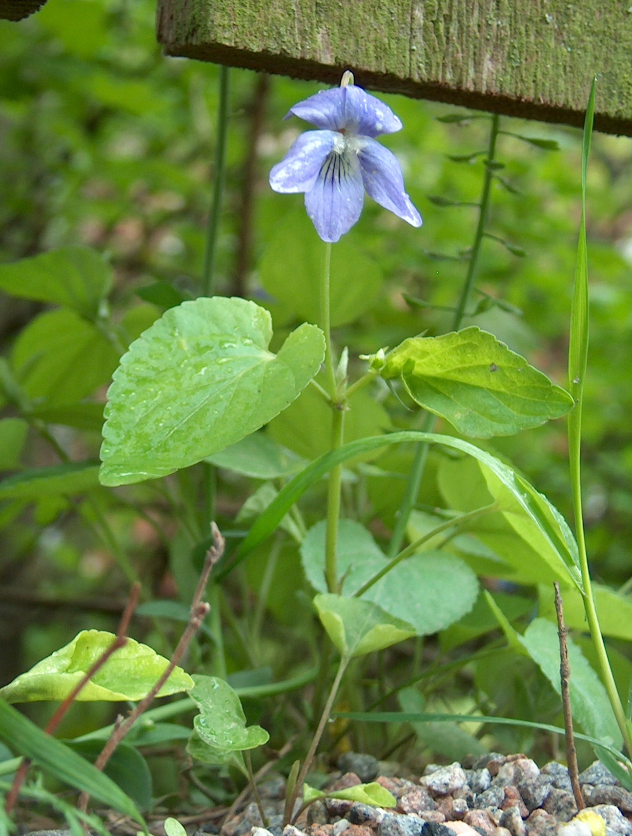 Viola riviniana in Kerava Finland